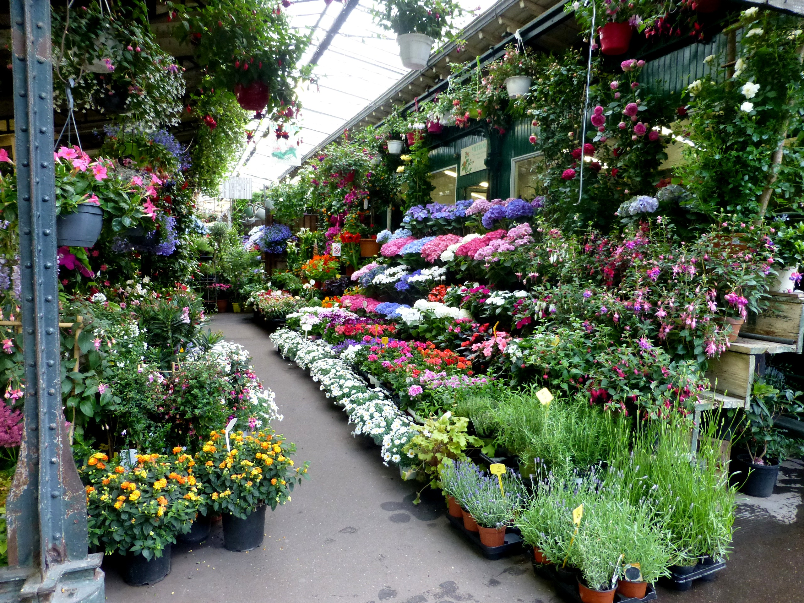 Paris, Marché aux fleurs Reine-Elizabeth-II, mai 2016.